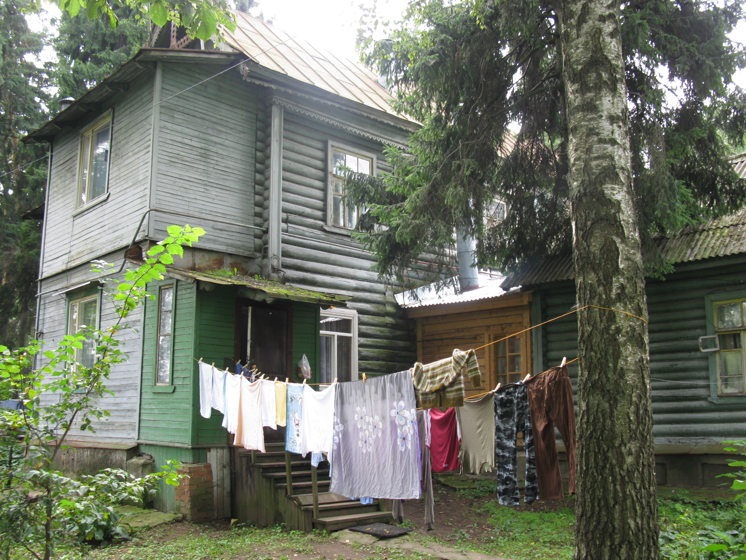 Фотография дачи Печатнова в Черкизовском парке